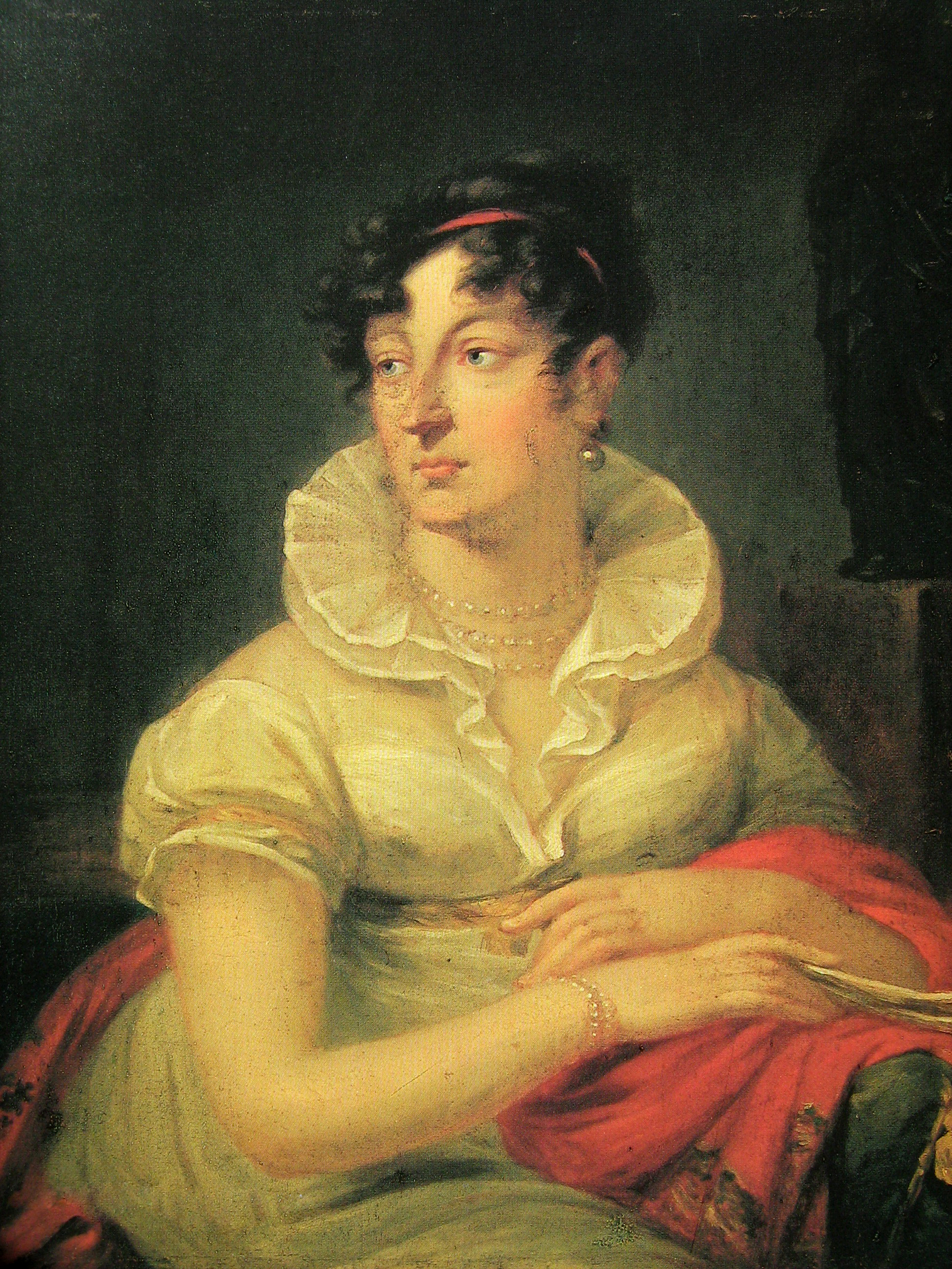 Пестель Елизавета Ивановна (урожденная фон Крок) (1766—1836)